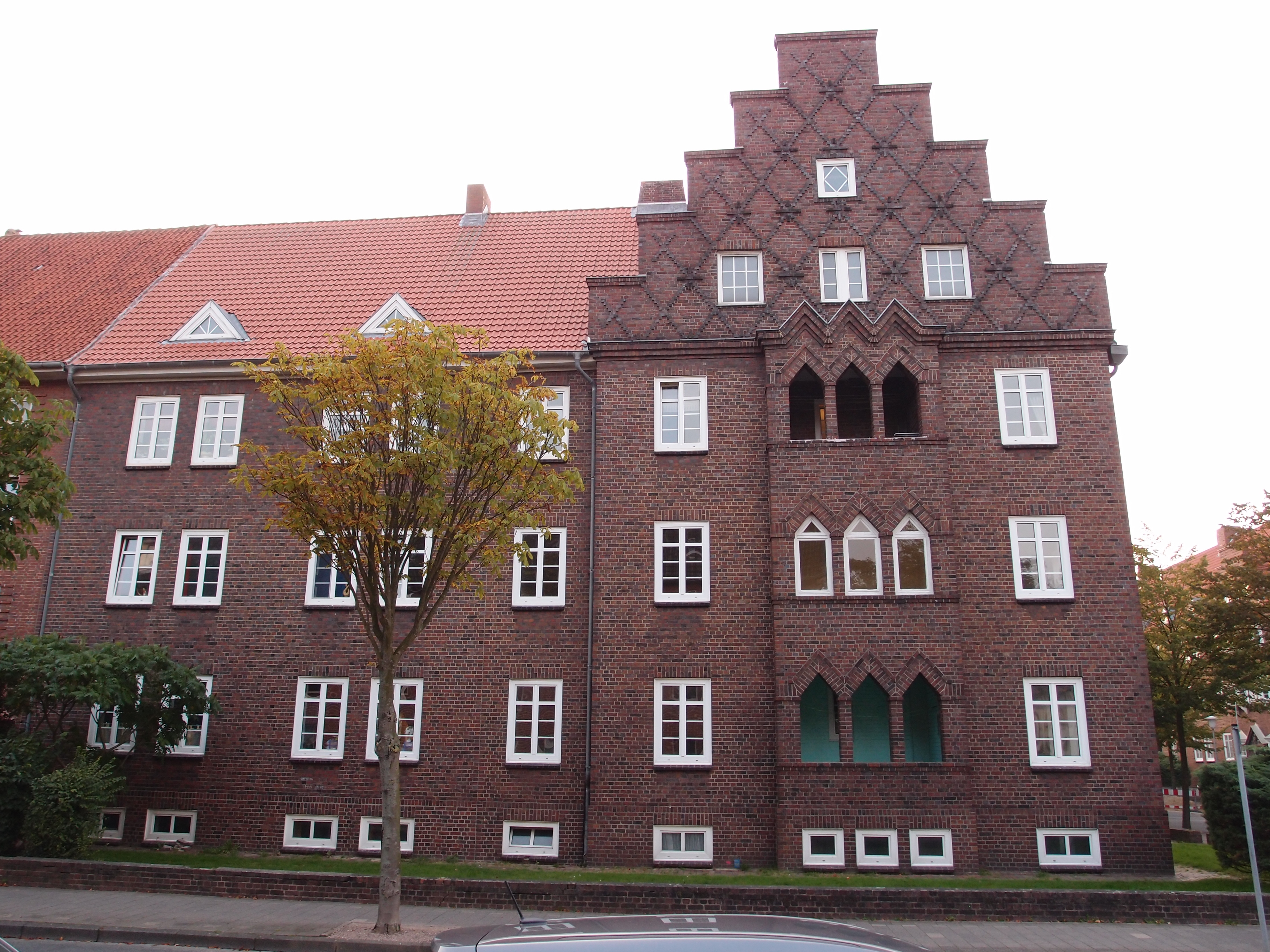 Cuxhaven Gorch-Fock-Strasse 15 Ansicht Hermann-Allmers-Strasse. Ensemble